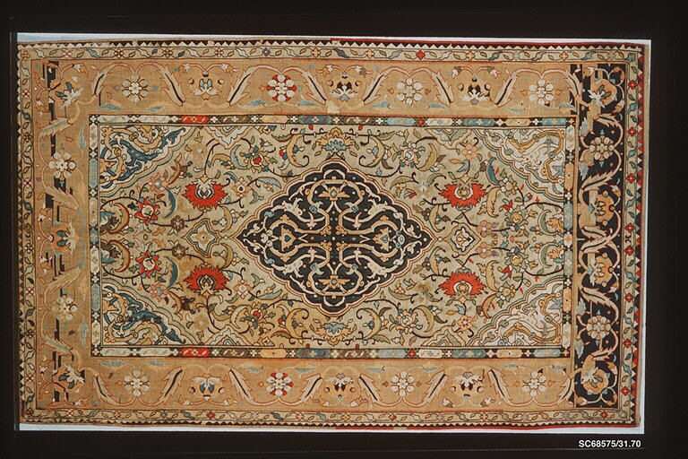 Textiles ;Rugs ; carpets